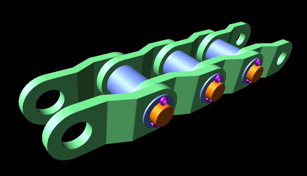 Hajlított hevederű görgős hajtólánclánc